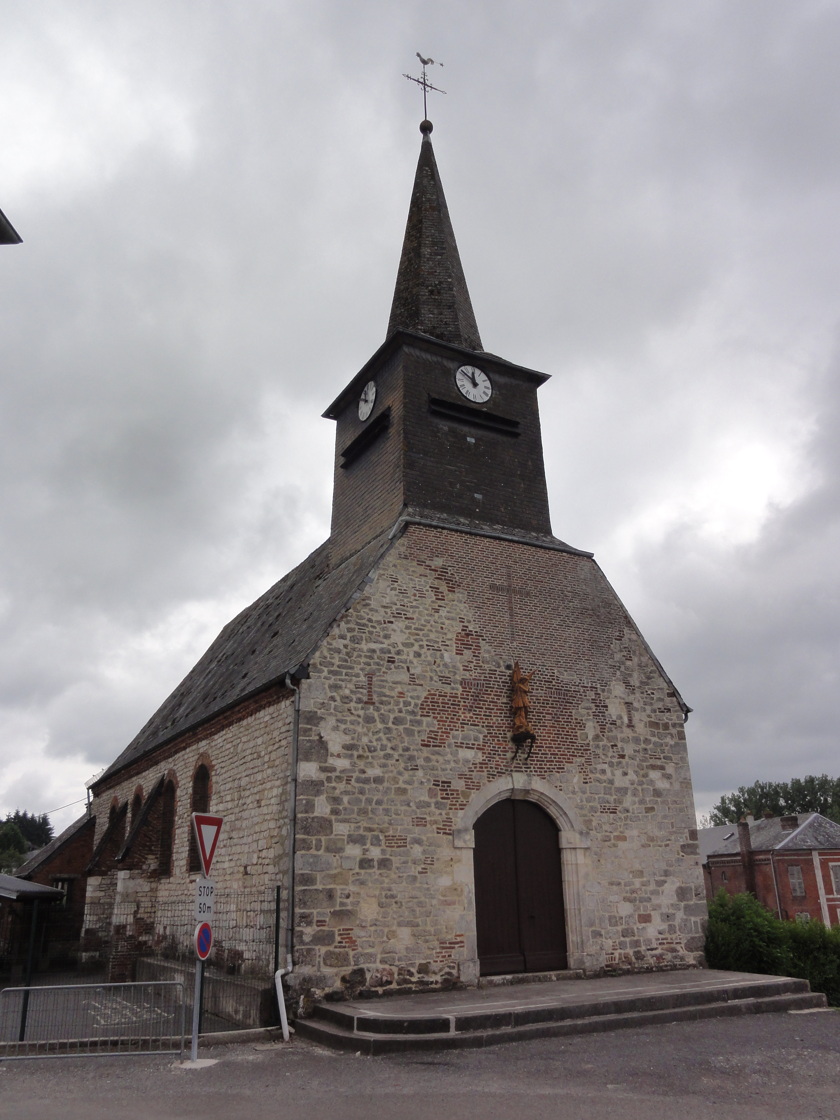 Leuze (Aisne) église